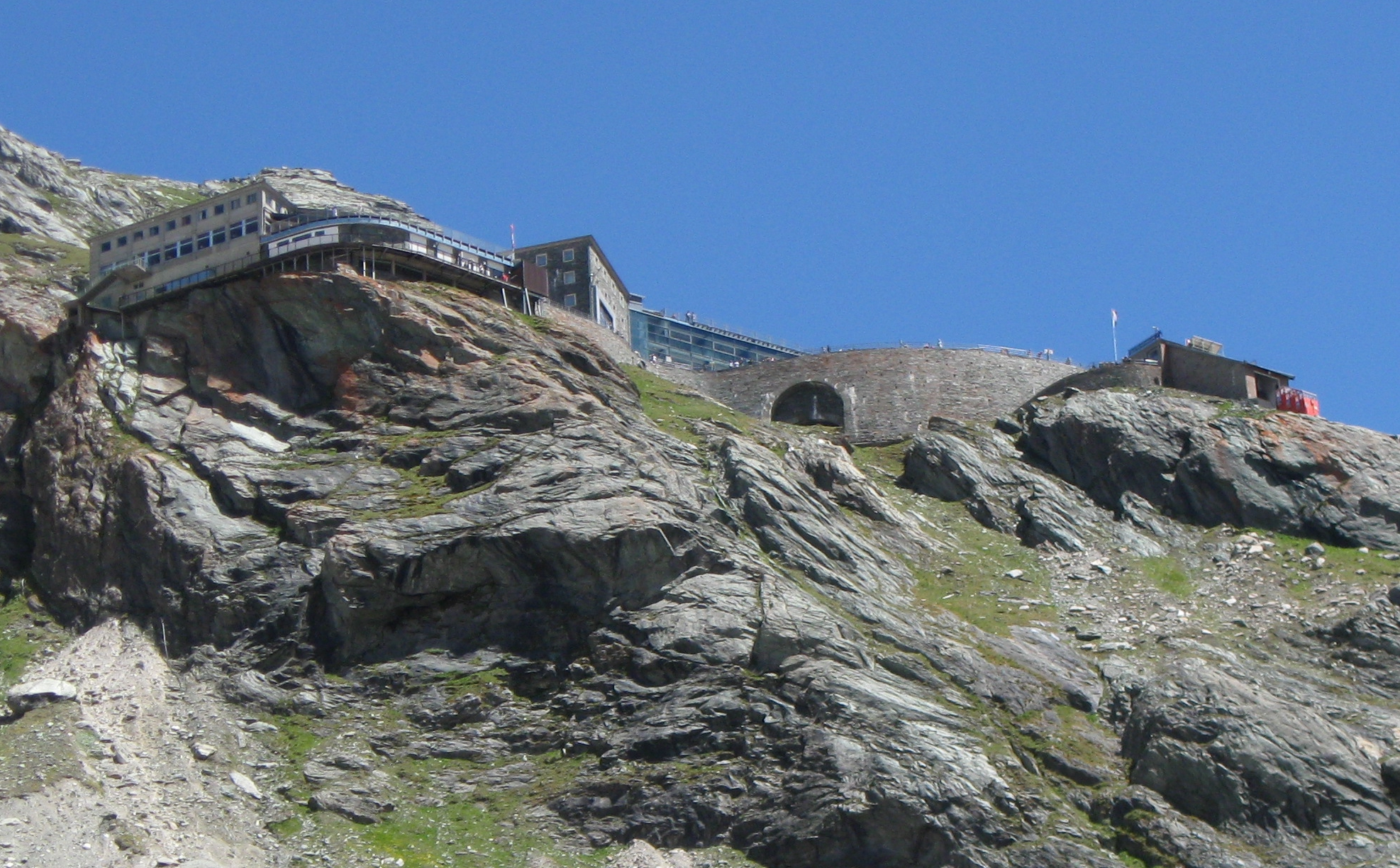 Kaiser-Franz-Josefs-Höhe von der Pasterze aus gesehen